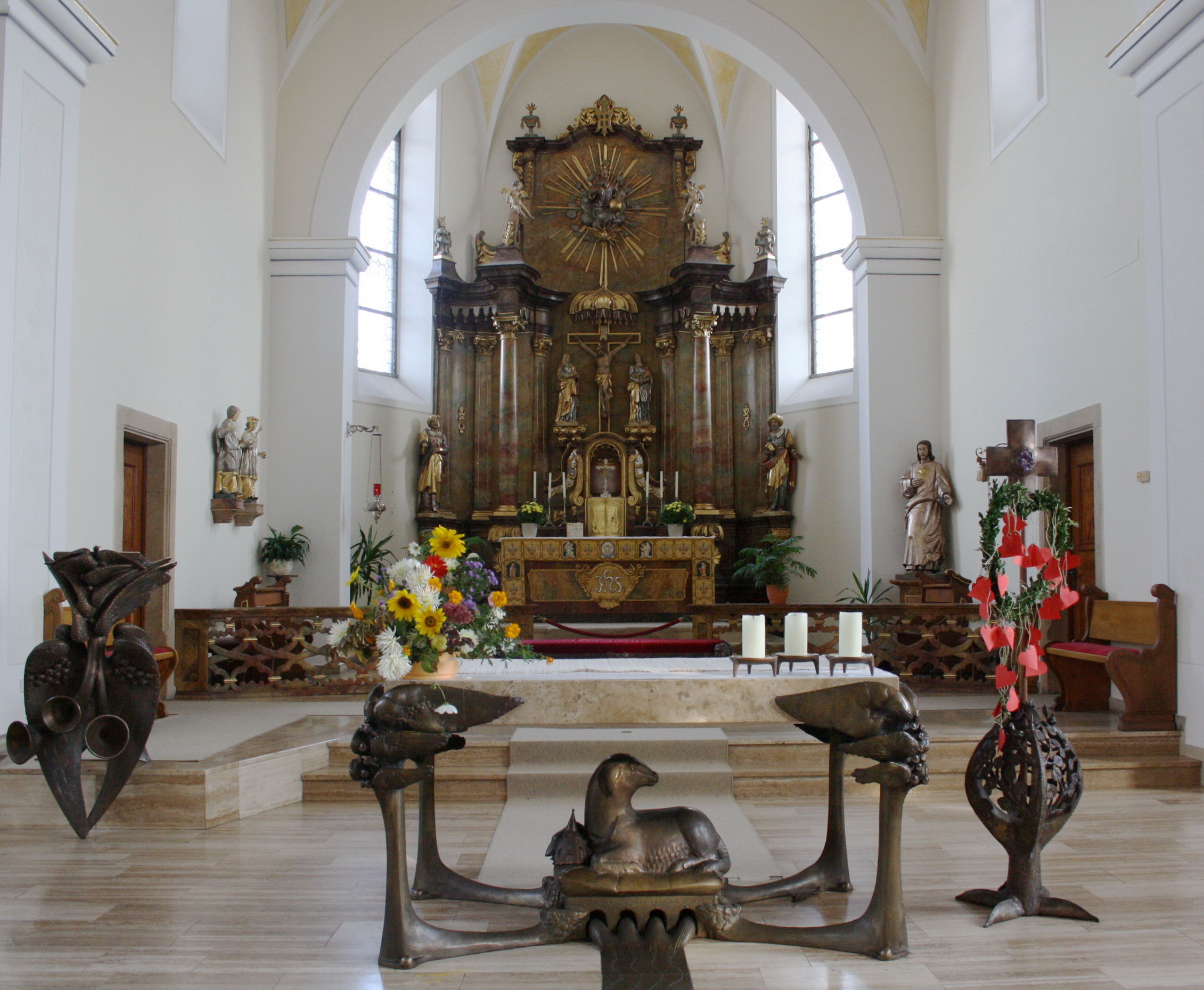 St. Cosmas und Damian, katholische Barockkirche im Ort Maikammer in der Pfalz